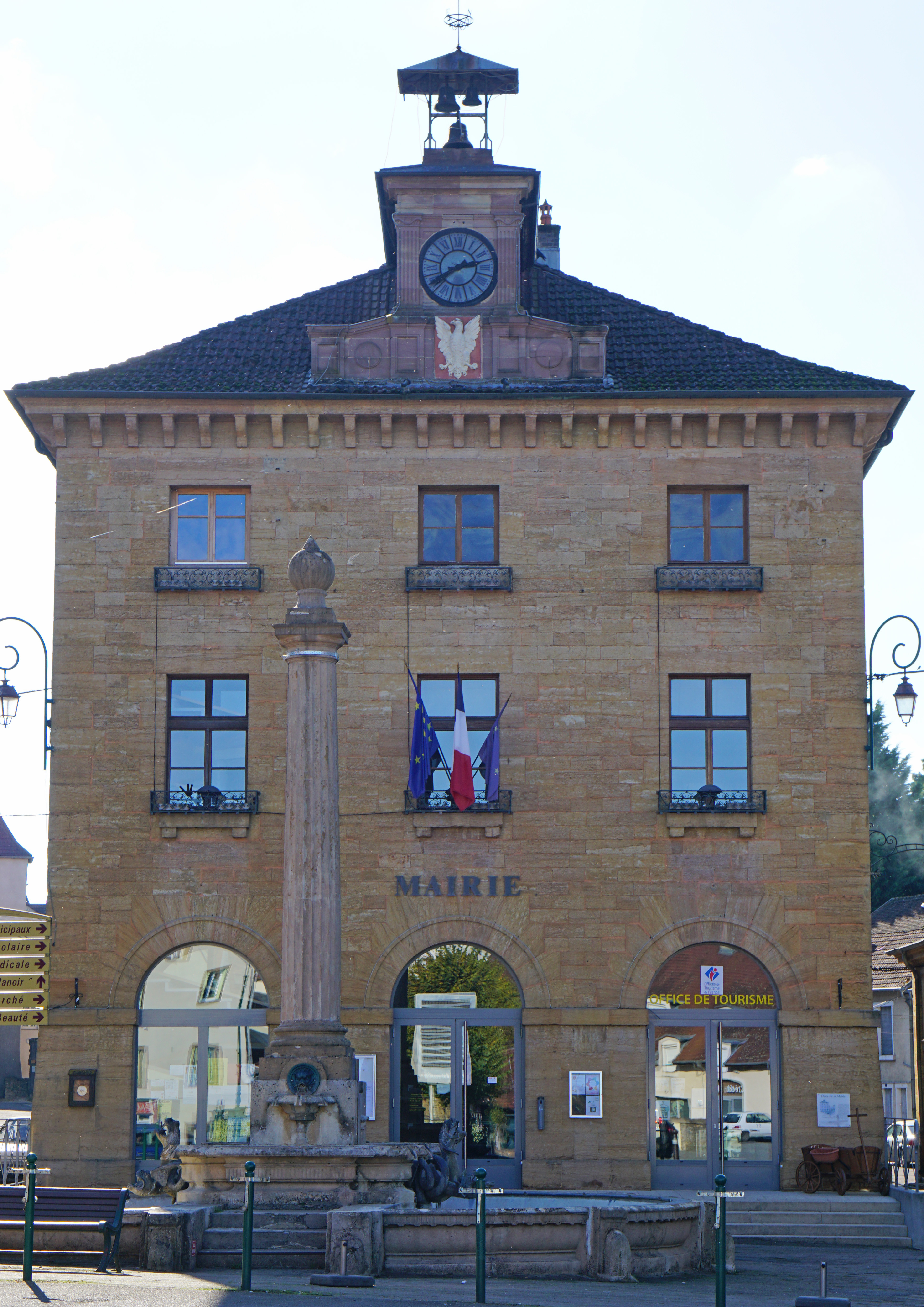 La mairie de Rougemont (Doubs).